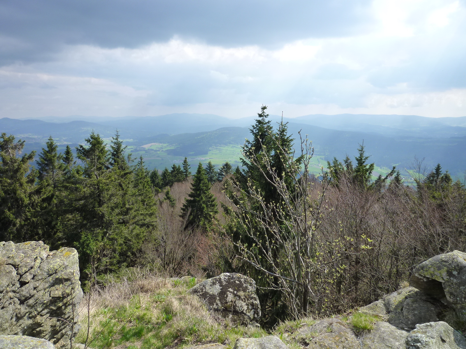 Blick über die Gipfelfelsen des Riedelstein. Der Riedelstein gehört zu den Geotopen der Gemeinde Arrach mit der Nr. 372R017.